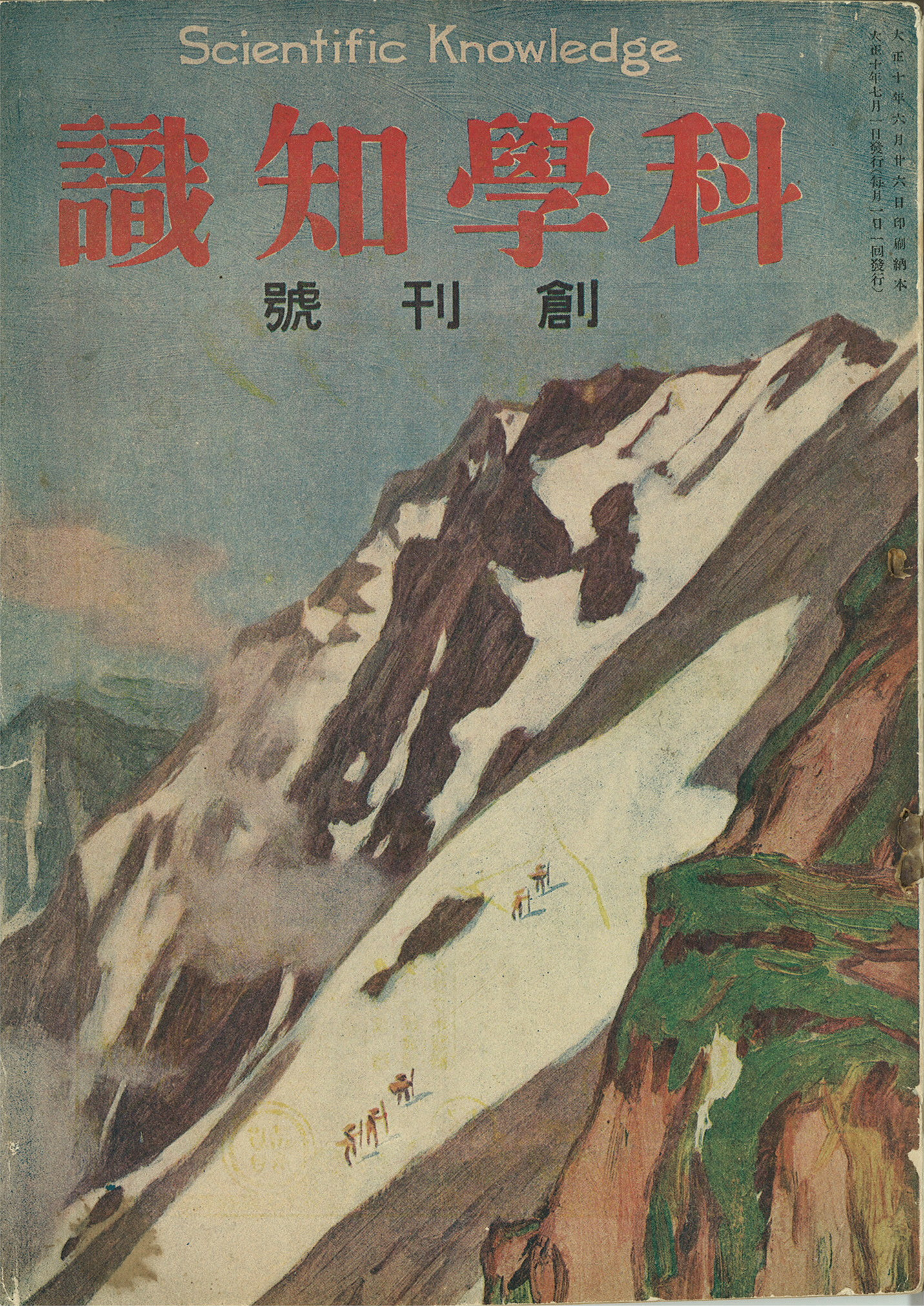 科学知識創刊号表紙